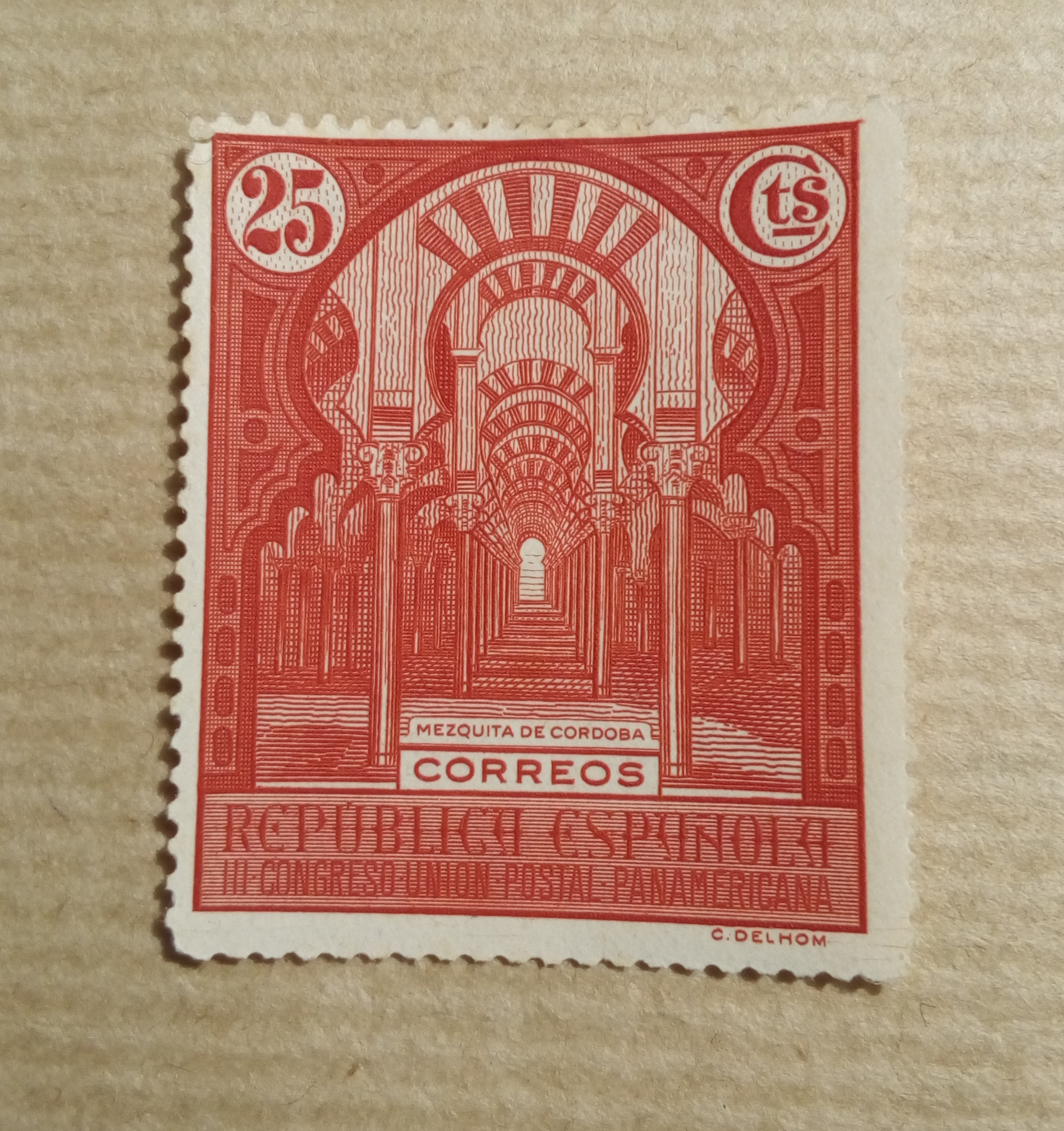 Sello de la II República Española, edifil 607, 1931